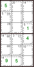 Egen teckning